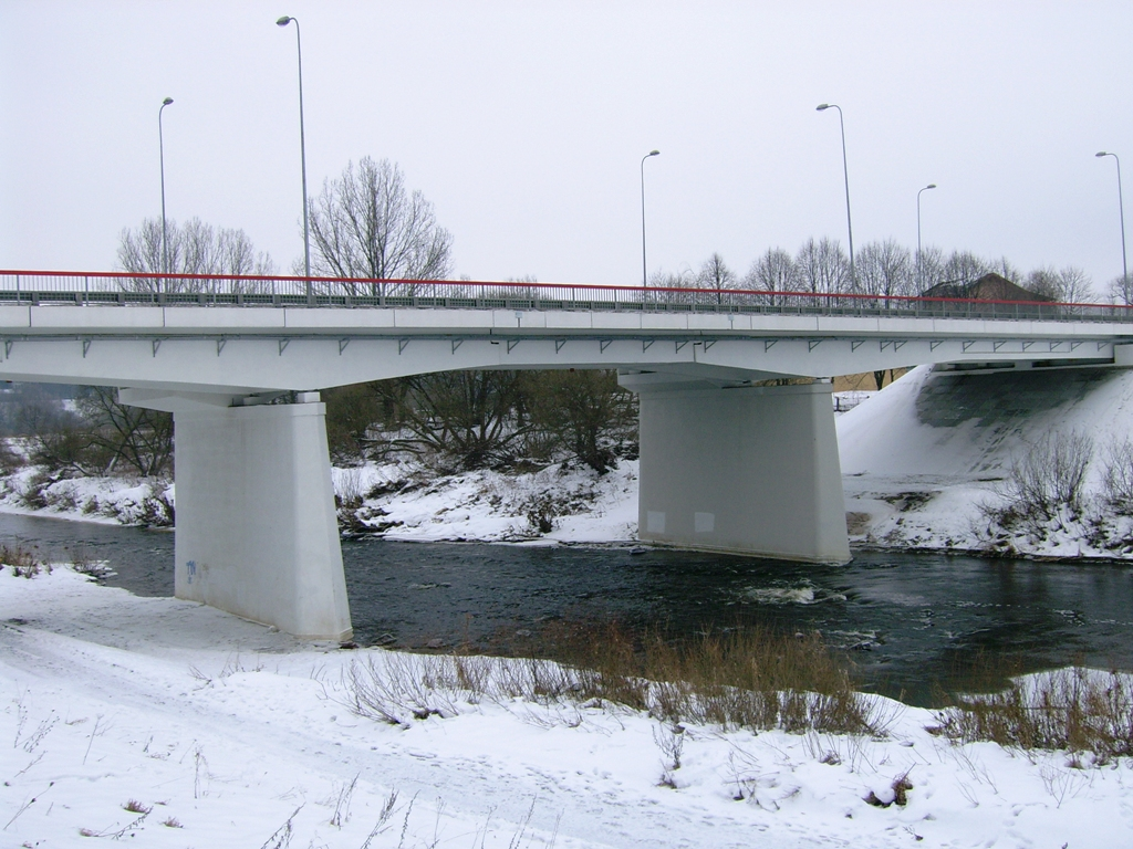 Tiltas per Jūrą Tauragėje